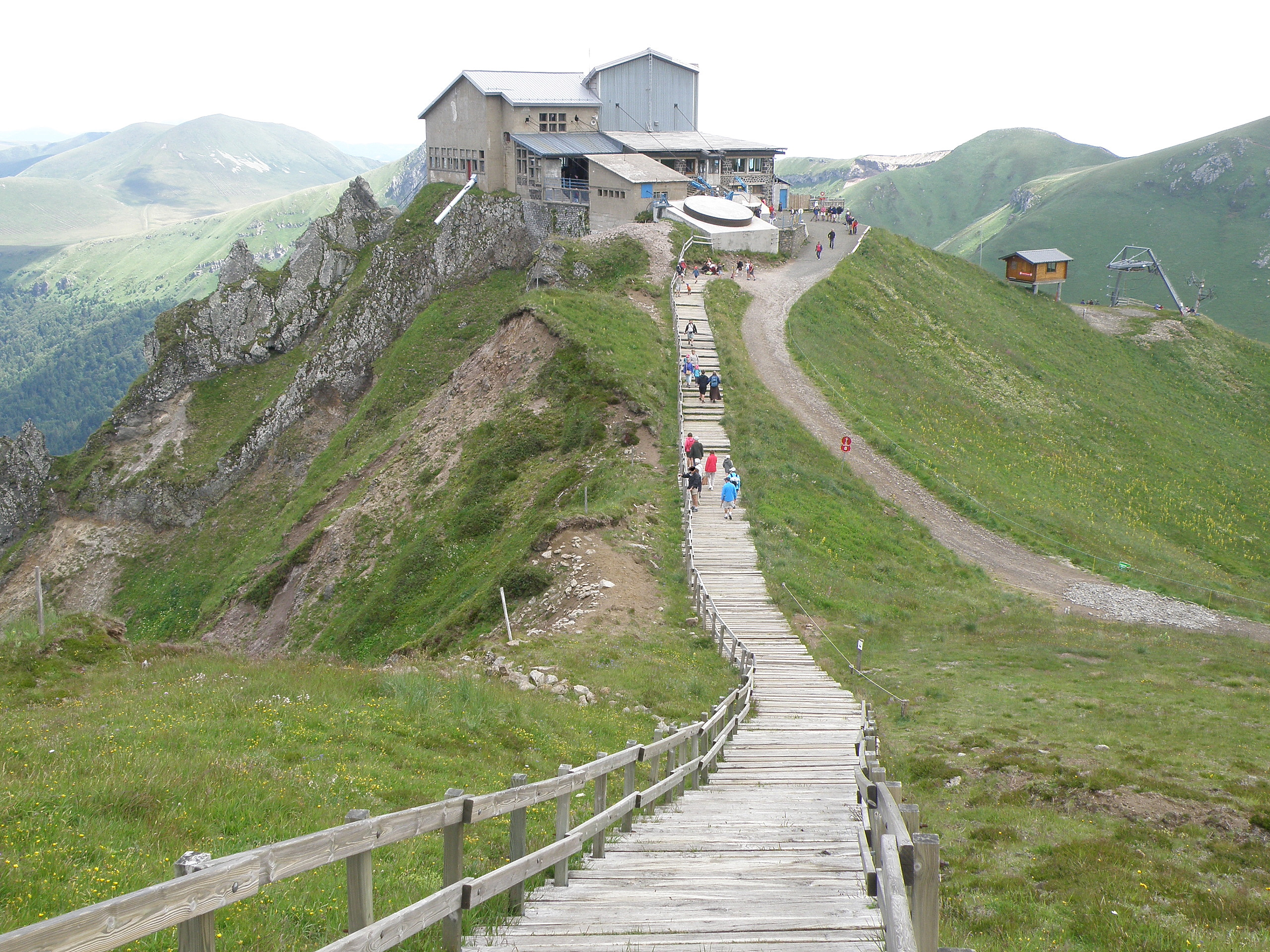 Le Mont-Dore, comm. du Puy-de-Dôme (France, région Auvergne). Massif du Sancy. Chemin de madriers menant de la station du téléphérique (visible en face de nous) au sommet du puy de Sancy (lequel est derrière nous). Coup d'œil vers le nord-est.